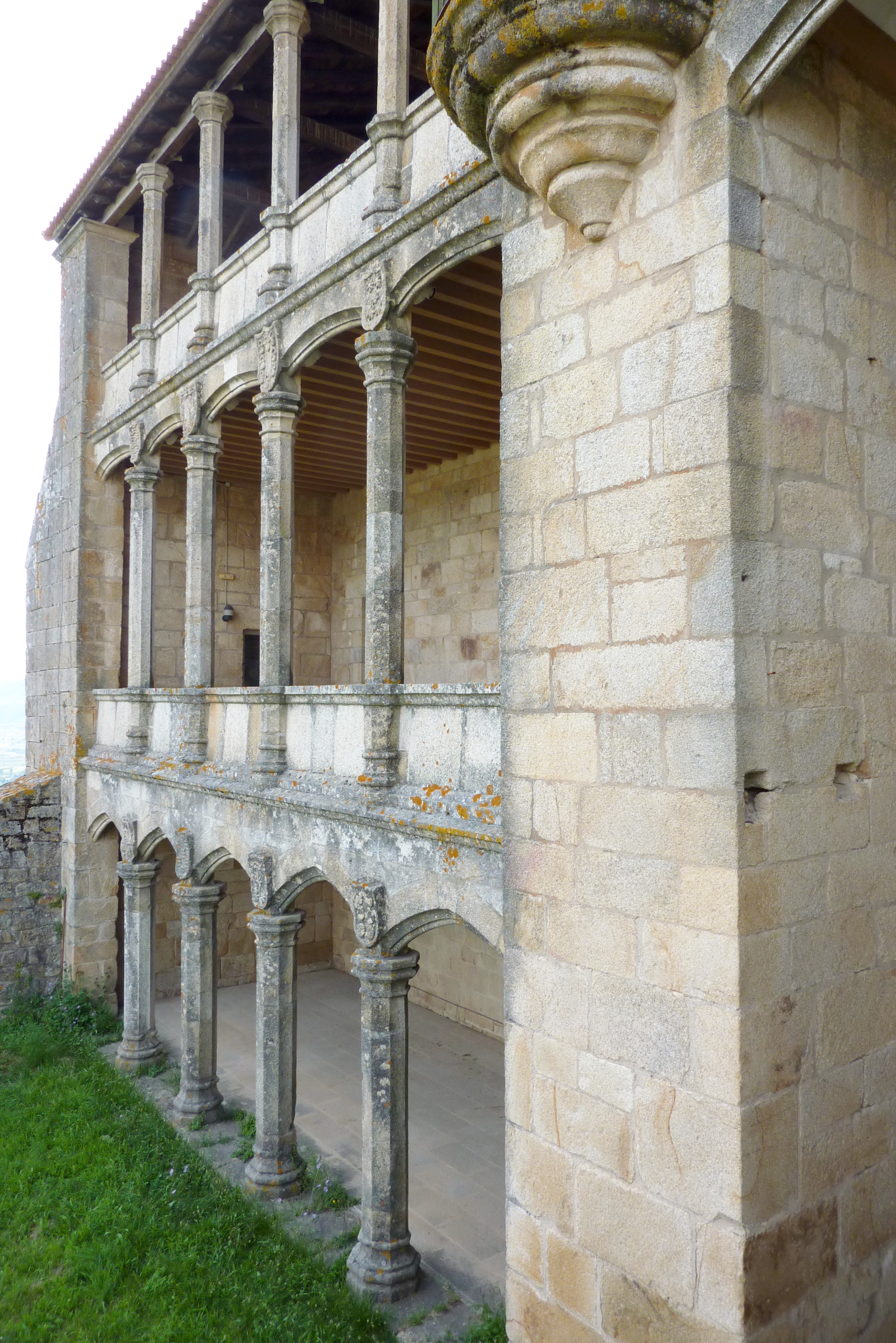 Castillo de Monterrei in der spanischen Provinz Ourense (Galicien), Palacio de los Condes (16. Jh.)